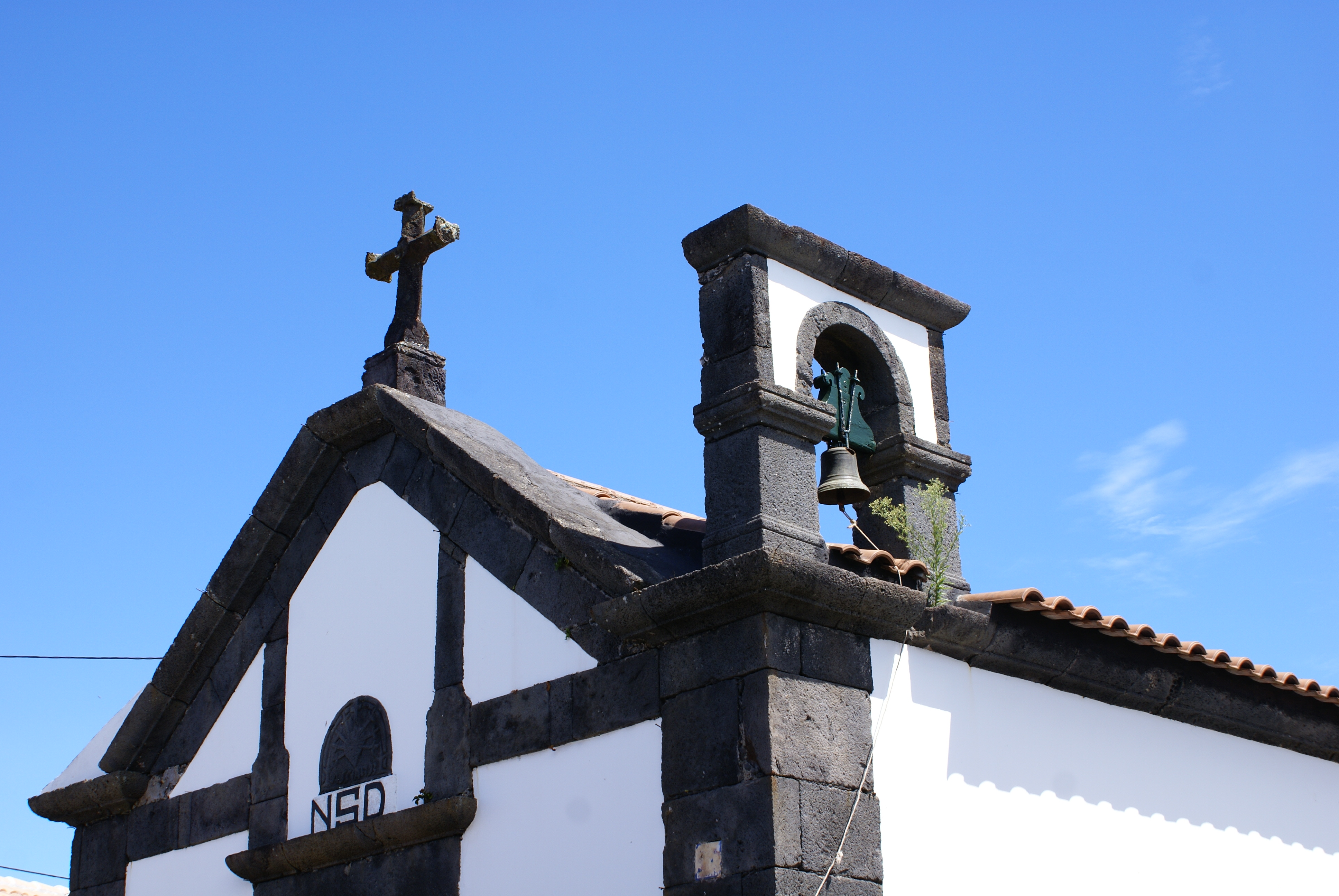 Ermida de Nossa Senhora das Dores, pormenores, Dores, Santa Cruz da Graciosa, ilha Graciosa, Açores, Portugal